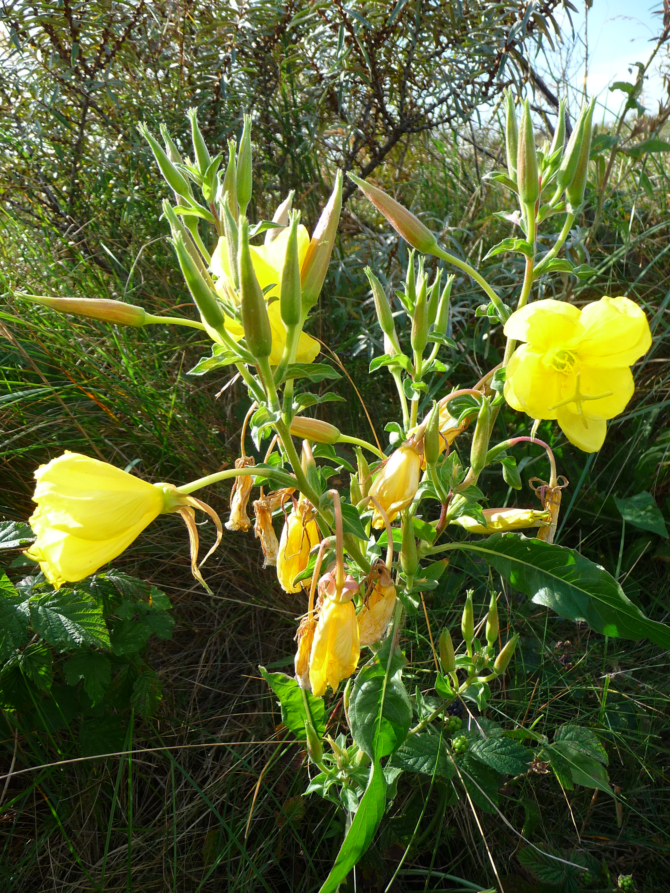 Dünen-Nachtkerze (Oenothera oakesiana), fotografiert auf der ostfriesischen Nordseeinsel Juist (Niedersachsen, Deutschland)